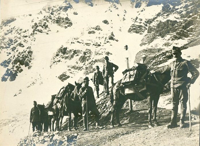 Снимка на австро-унгарска военна колона с муниции по високопланински път.